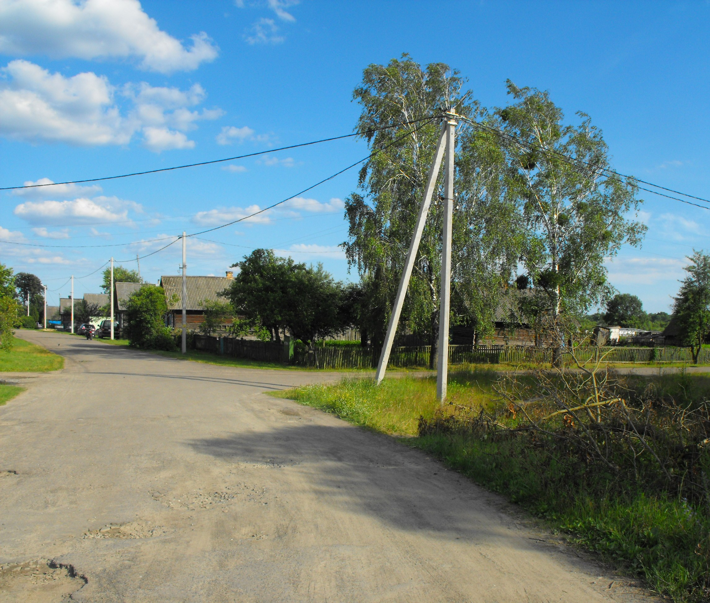 Вид на квартал в деревне Ленин Житковичского района, в котором в годы Второй мировой войны немецкие оккупанты организовали еврейское гетто.